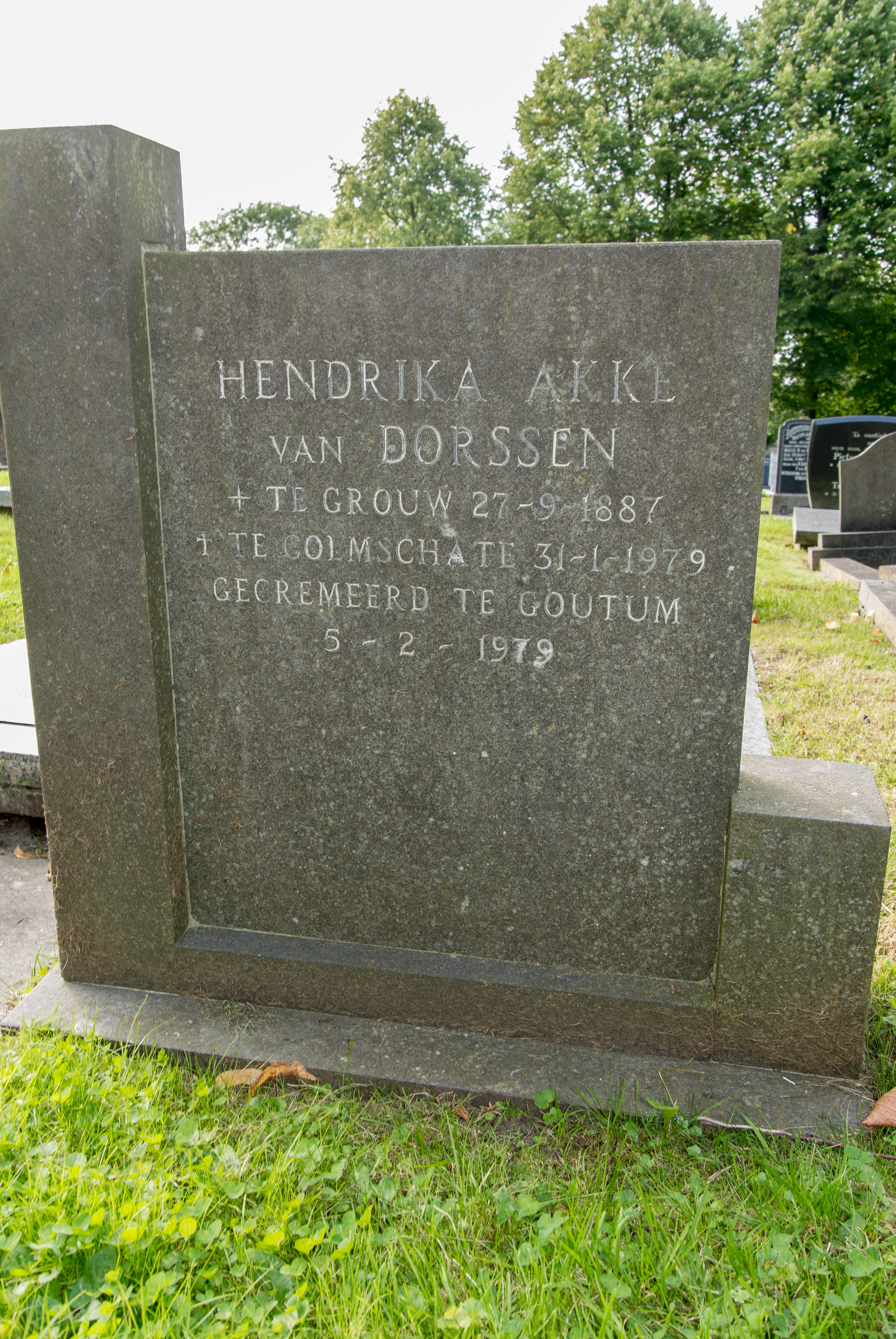 Gedenksteen voor de Friese schrijfster Hendrika Akke van Dorssen (27-09-1887 - 31-01-1979) op de begraafplaats in Grouw. Zij was als dichteres bekend onder de naam Rixt.